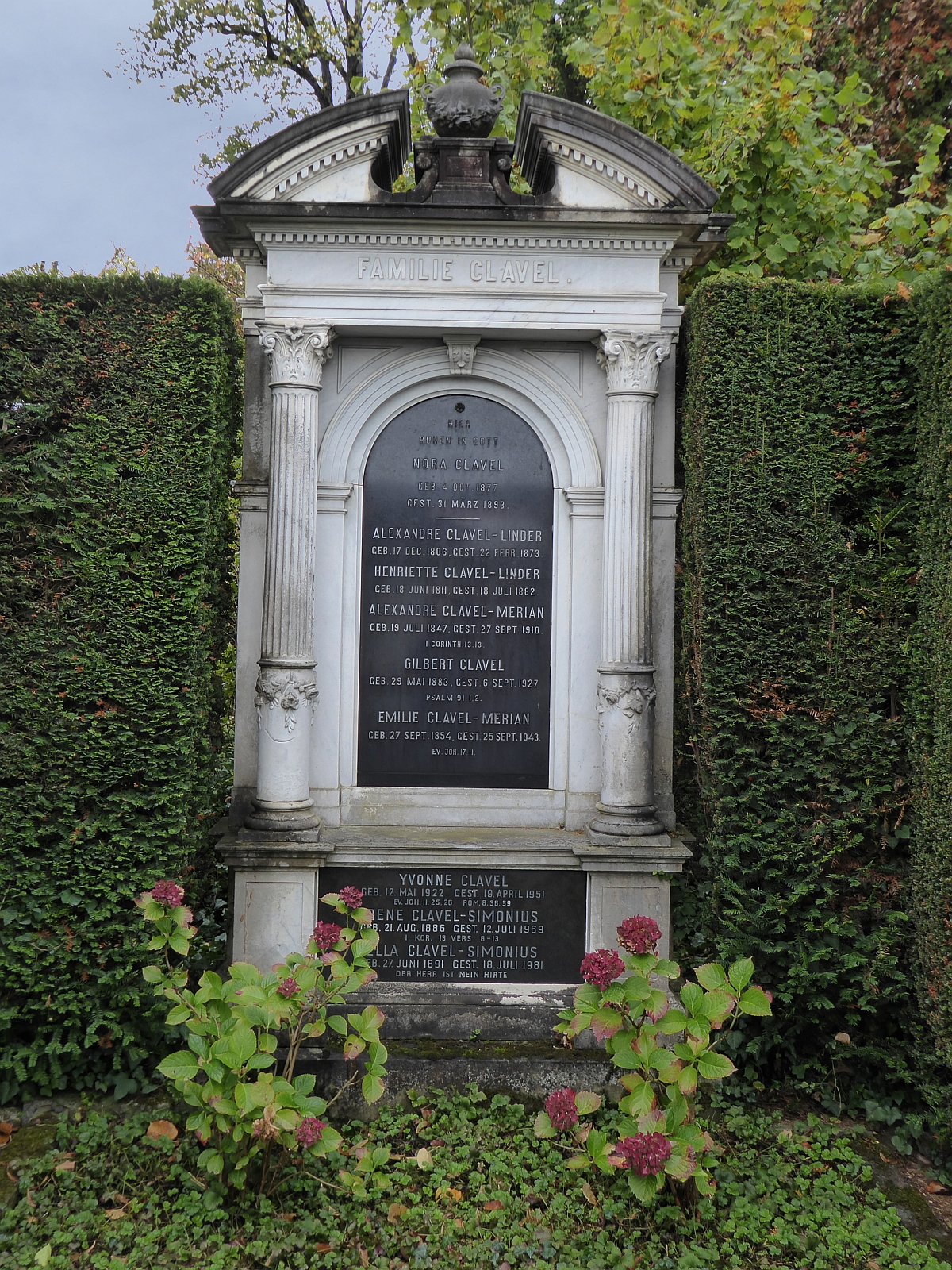 René Clavel-Simonius (1886–1969) Dr.ing.Chemiker, Dr.phil.h.c. Teilhaber Färberei Clavel, Lindenmeyer AG. Grab auf dem Friedhof Wolfgottesacker, Basel